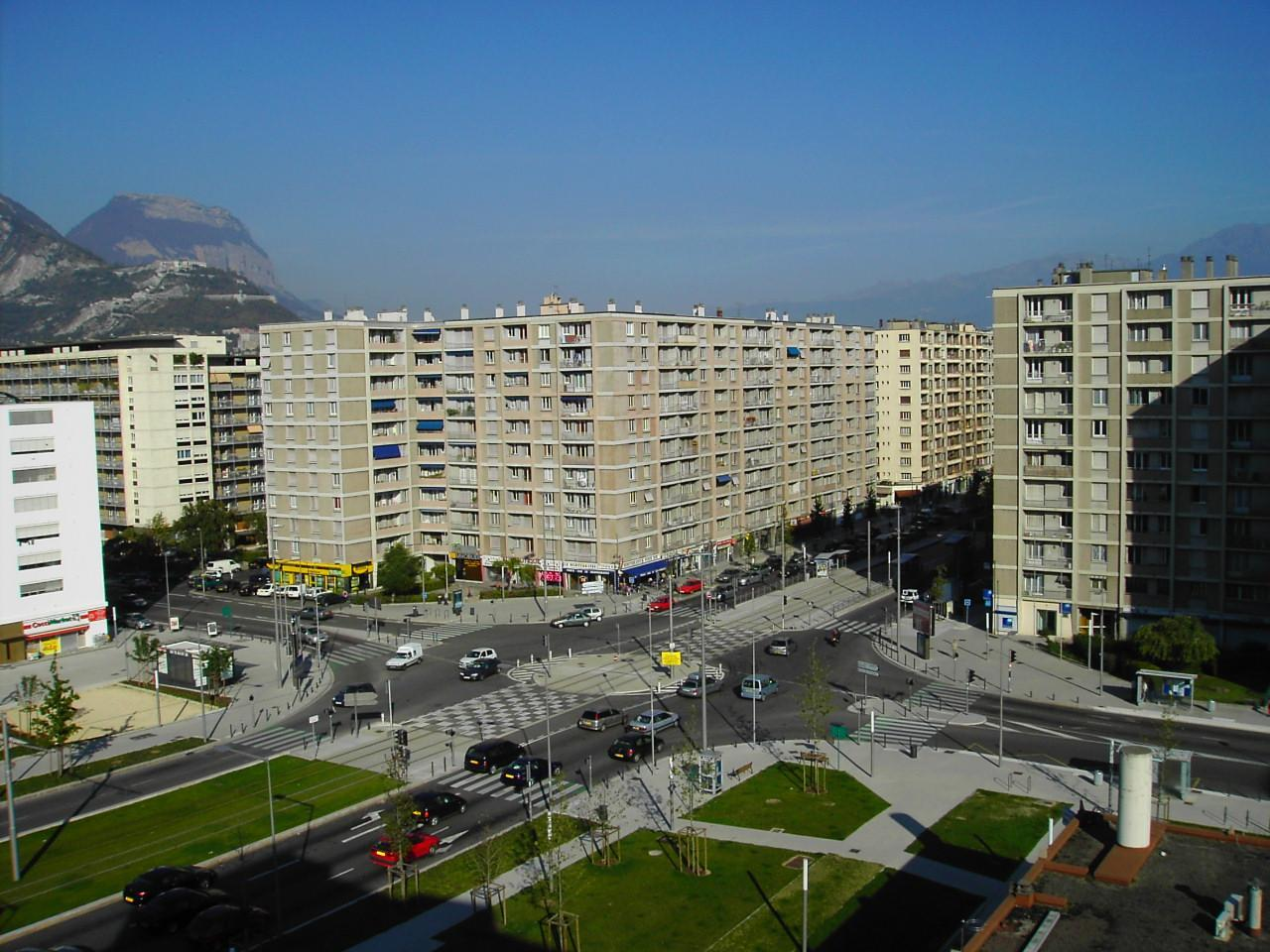 entrée Grenoble, boulevard Joseph Vallier